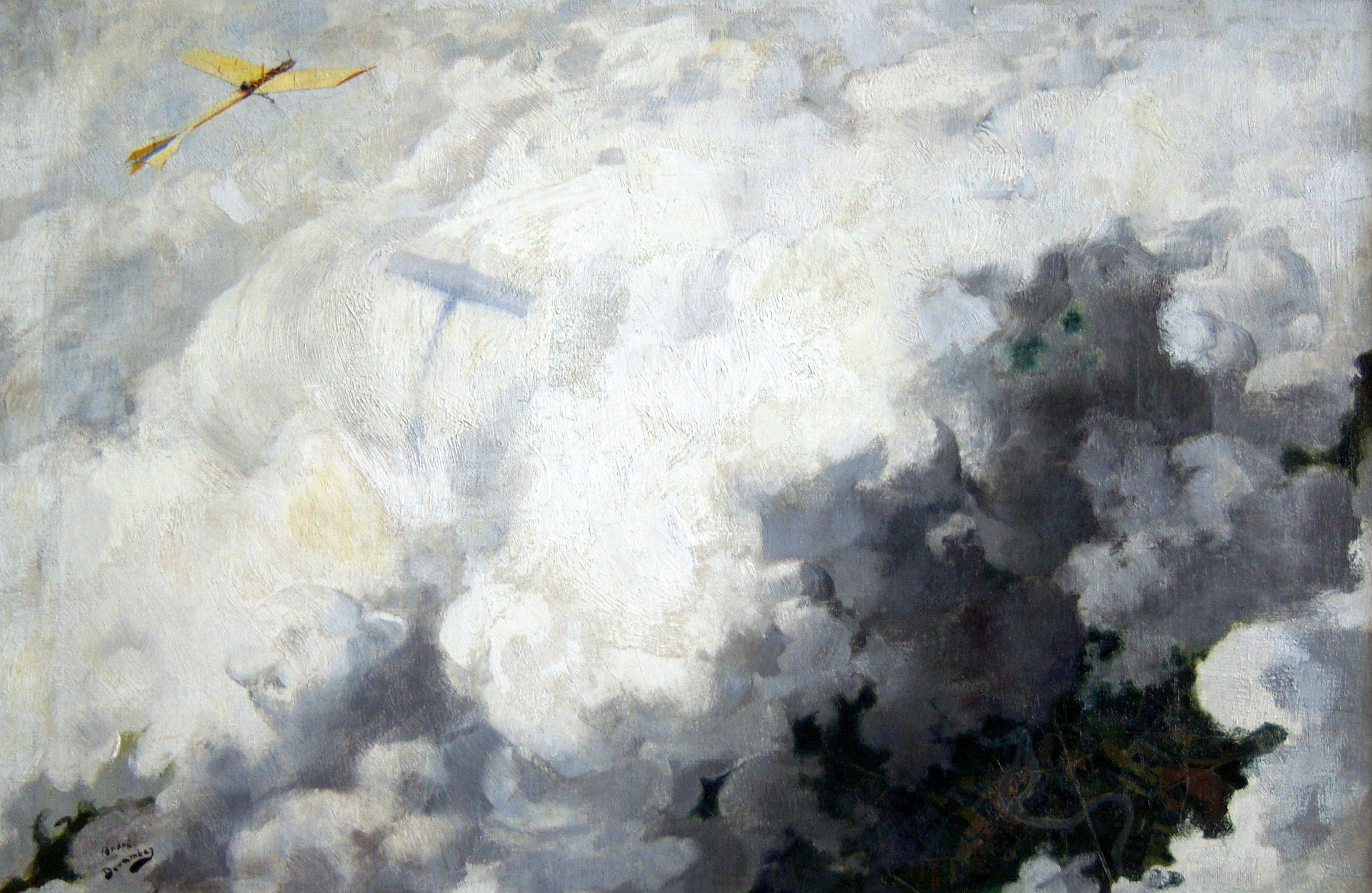 Le seul oiseau qui vole au dessus des nuages (1910) - Tableau d'André Devambez (1867-1944) se trouvant au Musée d'Orsay à Paris.